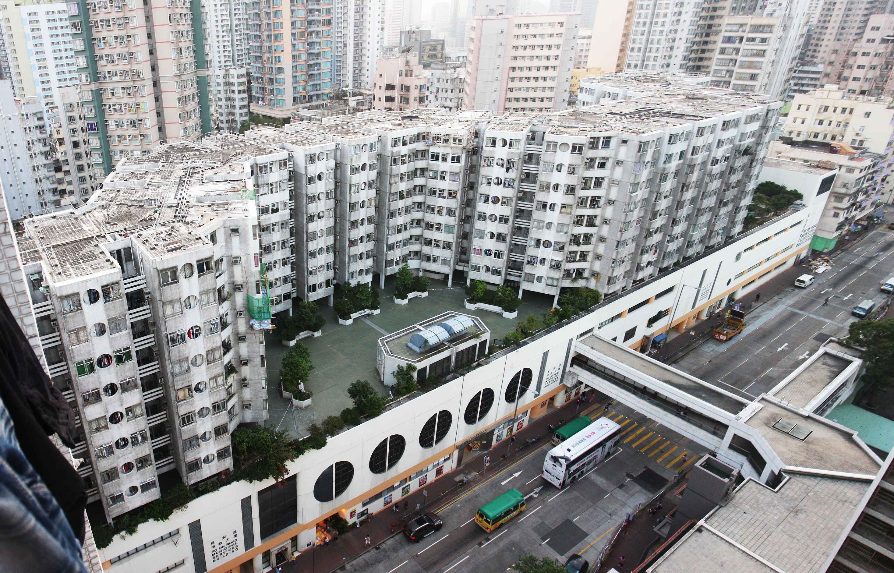 中文（香港）: 寶麗苑寶麗苑